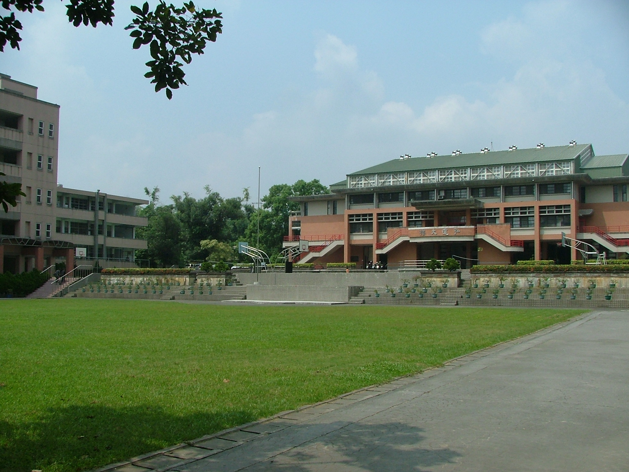 國立南投高級商業職業學校校景